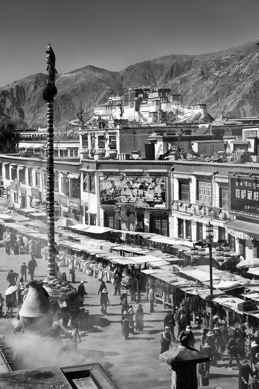 Tibet